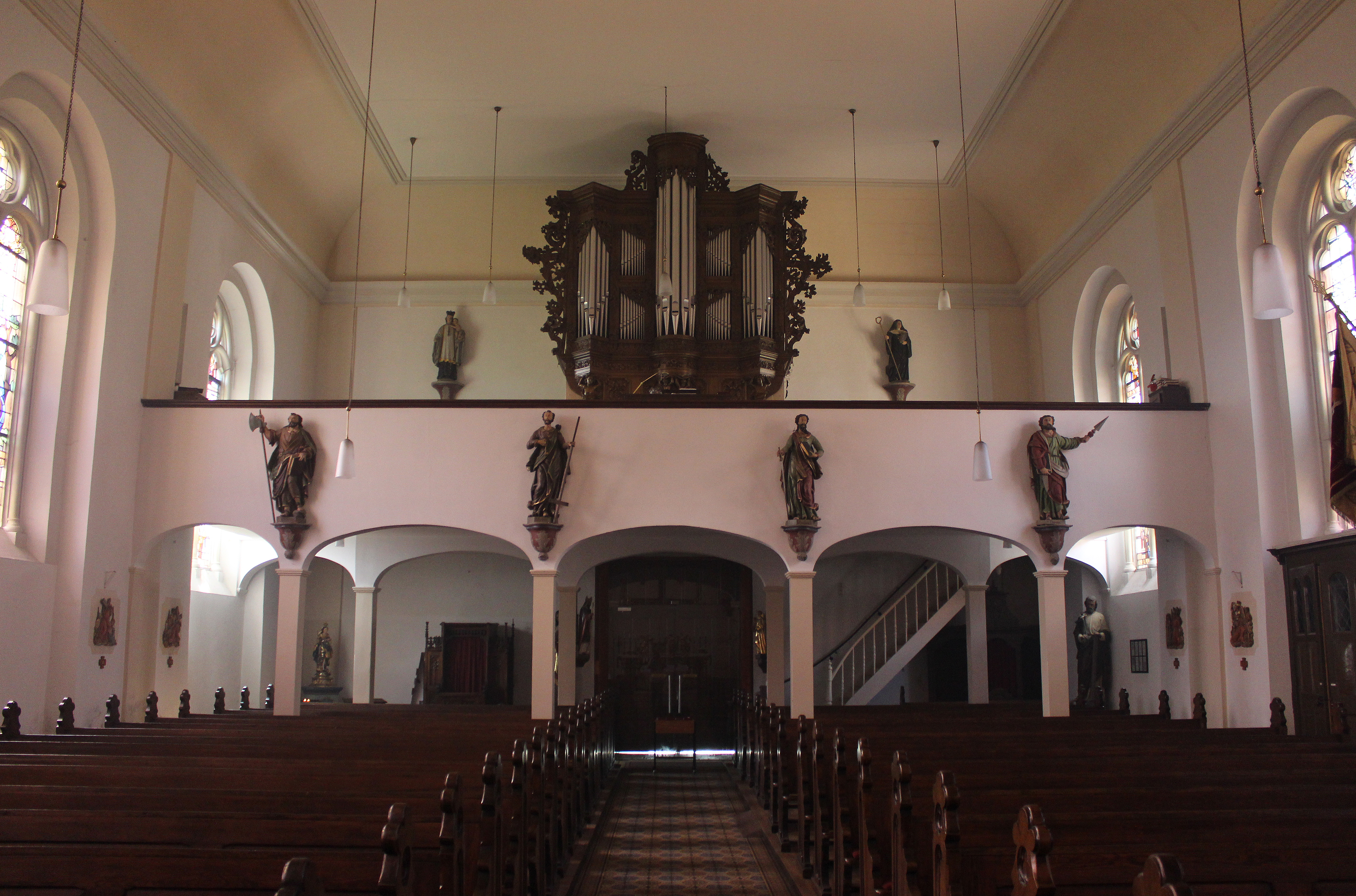 Blick ins Innere der katholischen Pfarrkirche St. Martin in Berus, einem Ortsteil der Gemeinde Überherrn, Landkreis Saarlouis, Saarland